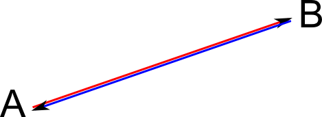 opposé d'un vecteur